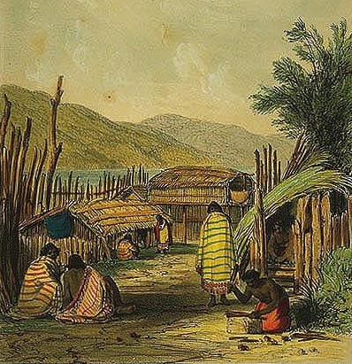 Pipitea marae, Wellington, curca 1840